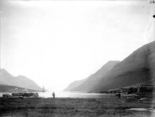 Hvannasund, Faroe Islands